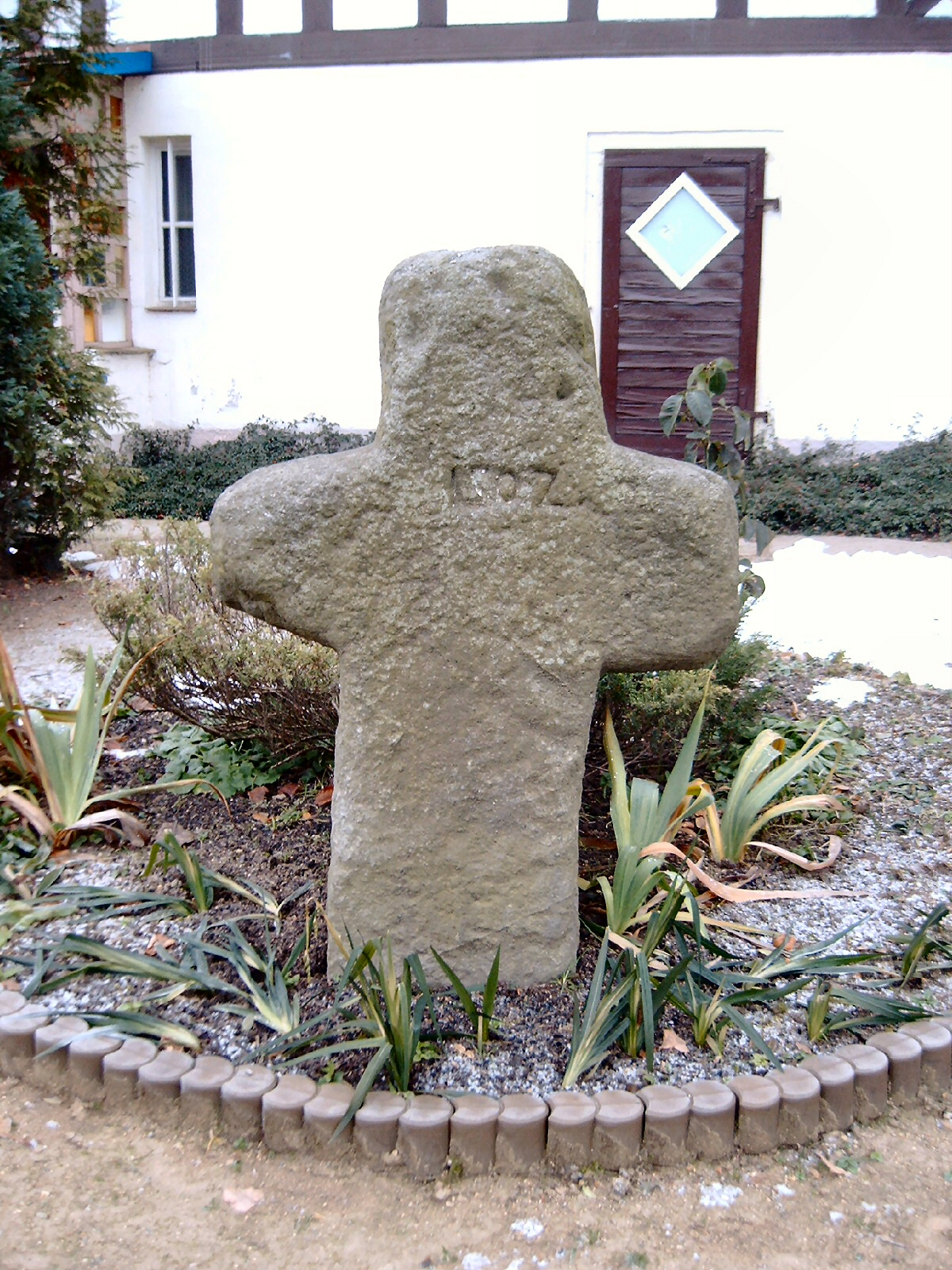 selbst fotografiert am 11.12.05 in Wehrsdorf